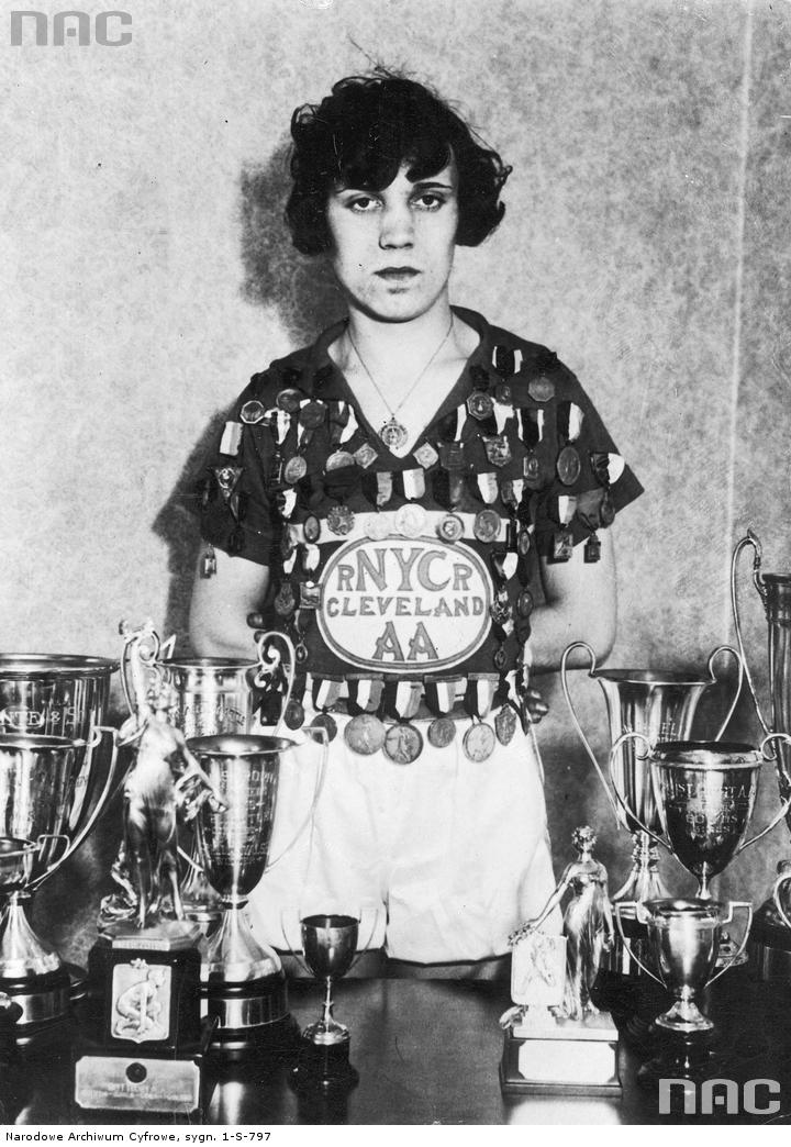 Stanisława Walasiewicz z nagrodami które zdobyła podczas swego pobytu w USA. Na koszulce ma poprzypinane medale.